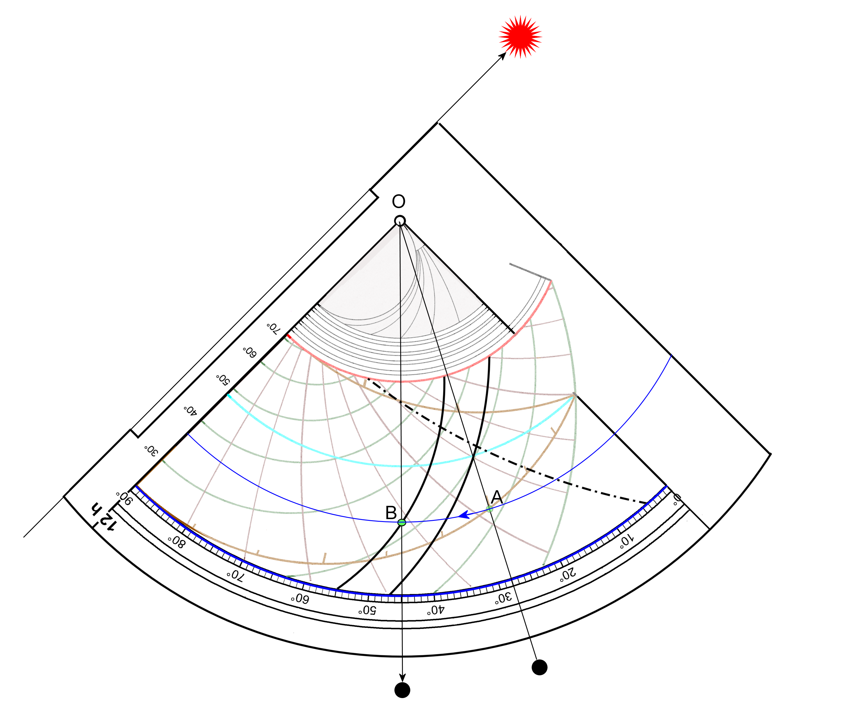 Détermination de l'instant où doit être annoncée la prière de l'asr 1.